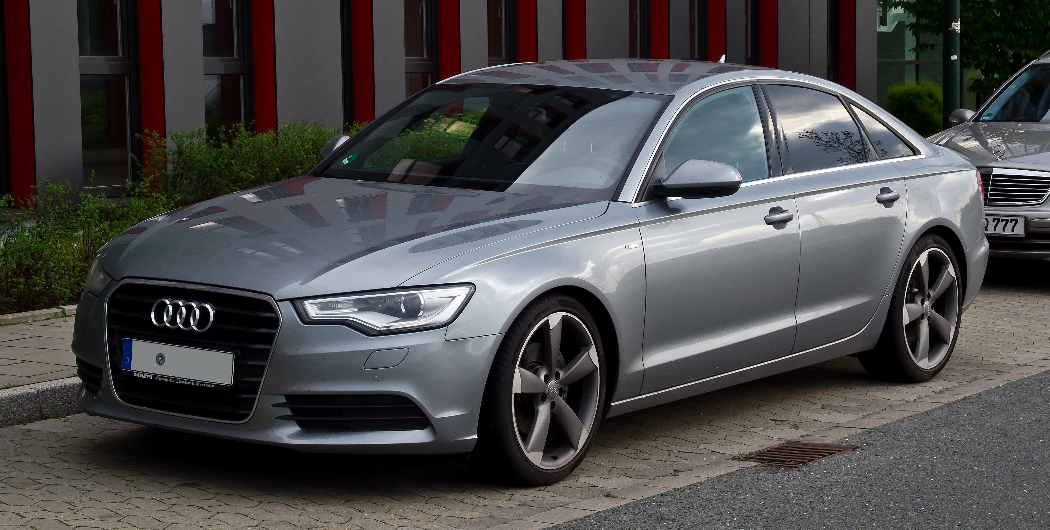 Audi A6 S-line (C7)